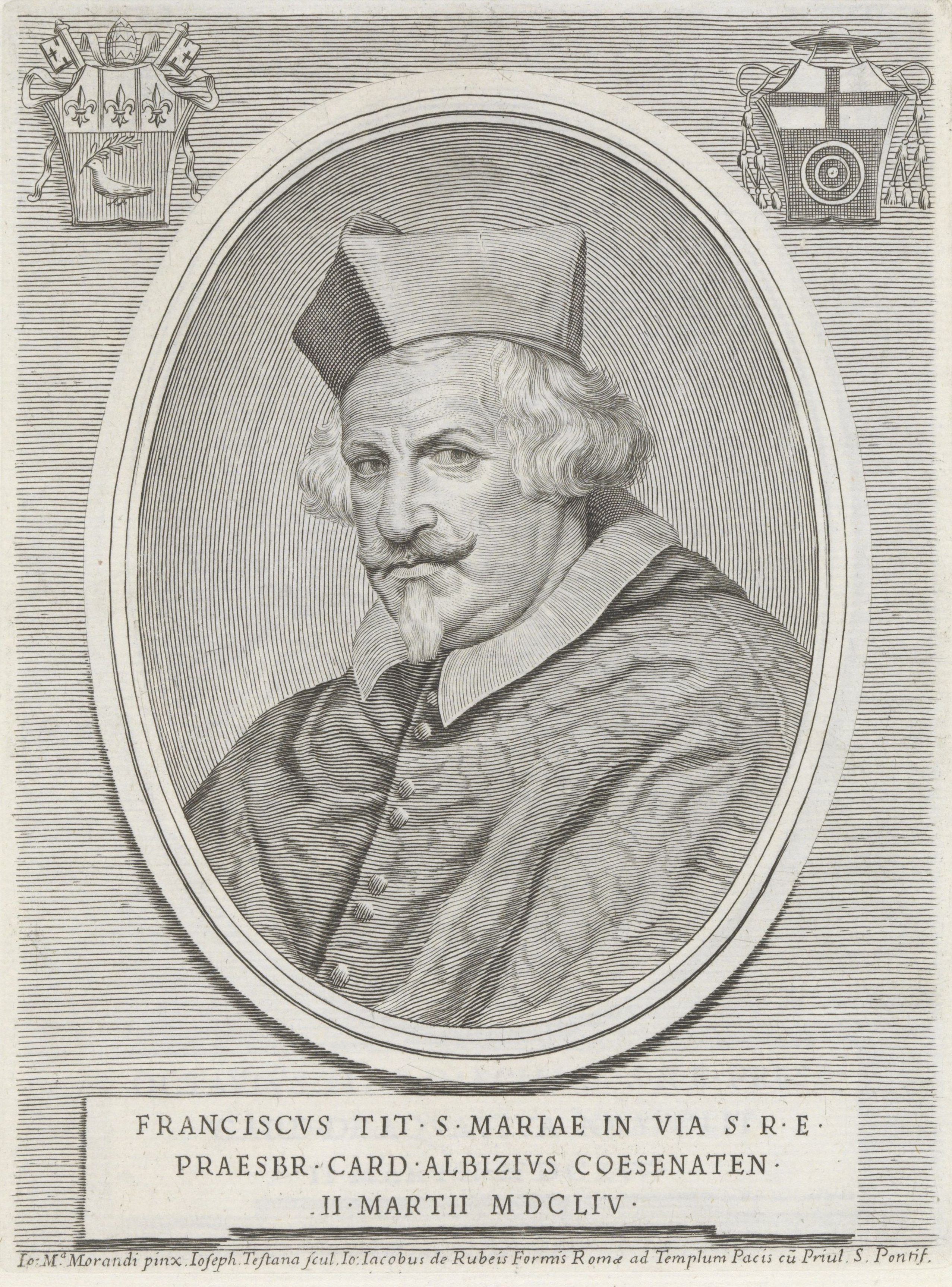 Linksboven het wapen van paus Innocentius X en rechtsboven het wapen van Albizzi. Onderaan een onderschrift in het Latijn.